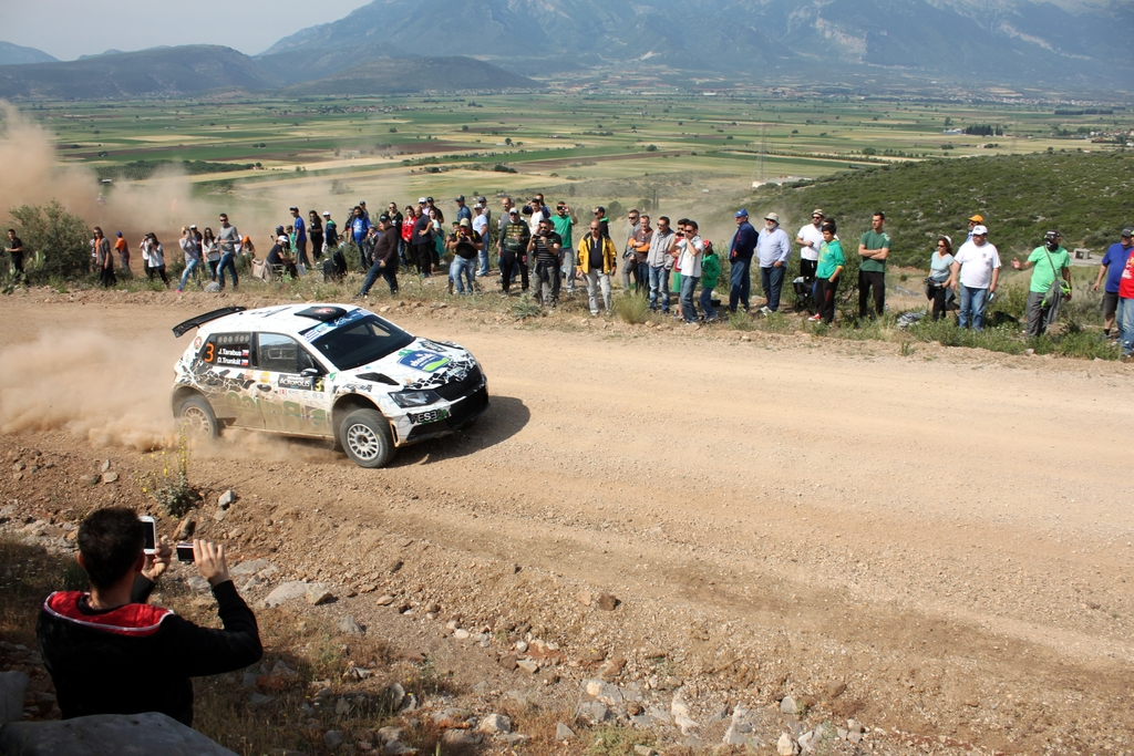 Jaromír Tarabus podczas 62 Rajdu Akropolis Grecji 2016